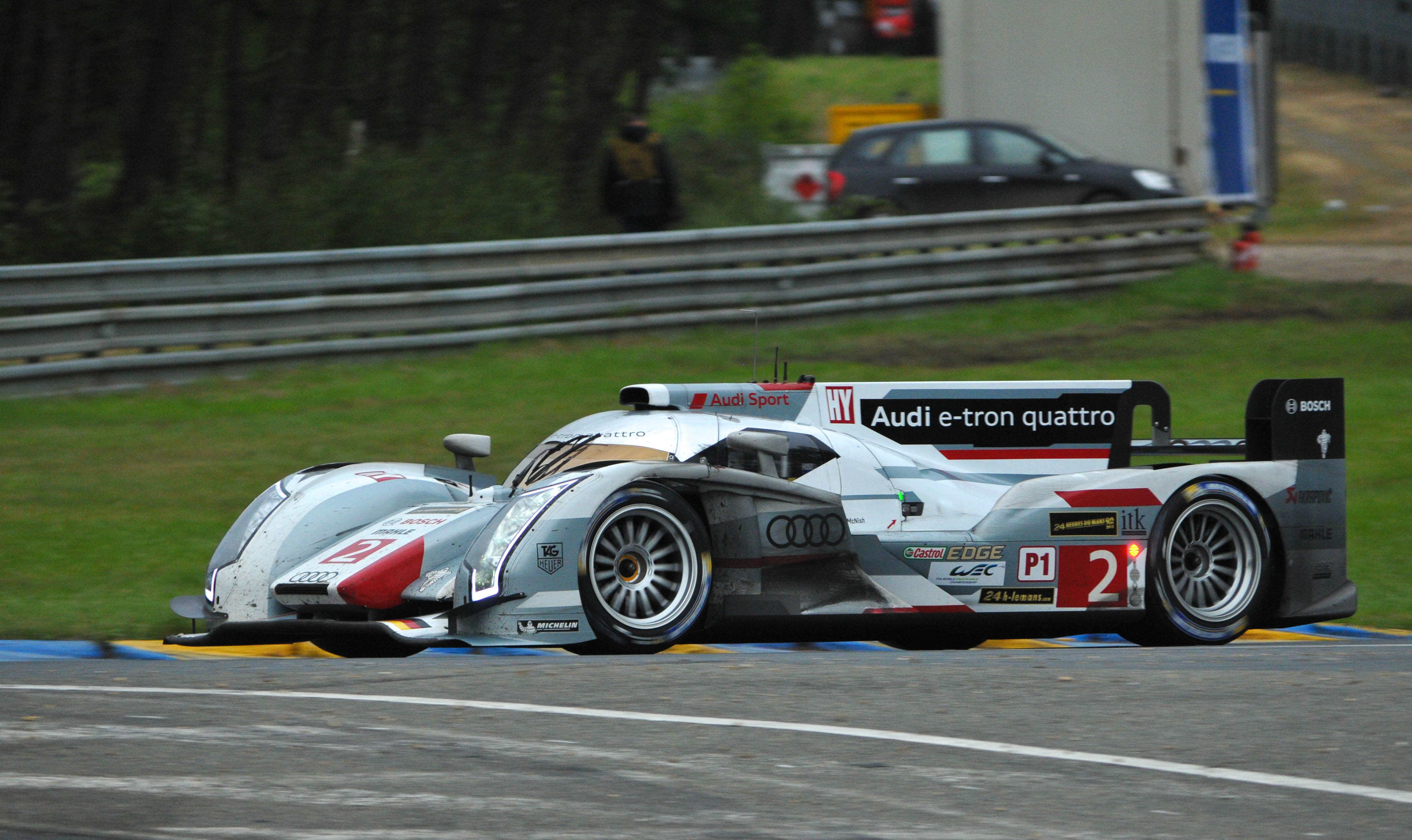 Le Mans 2013